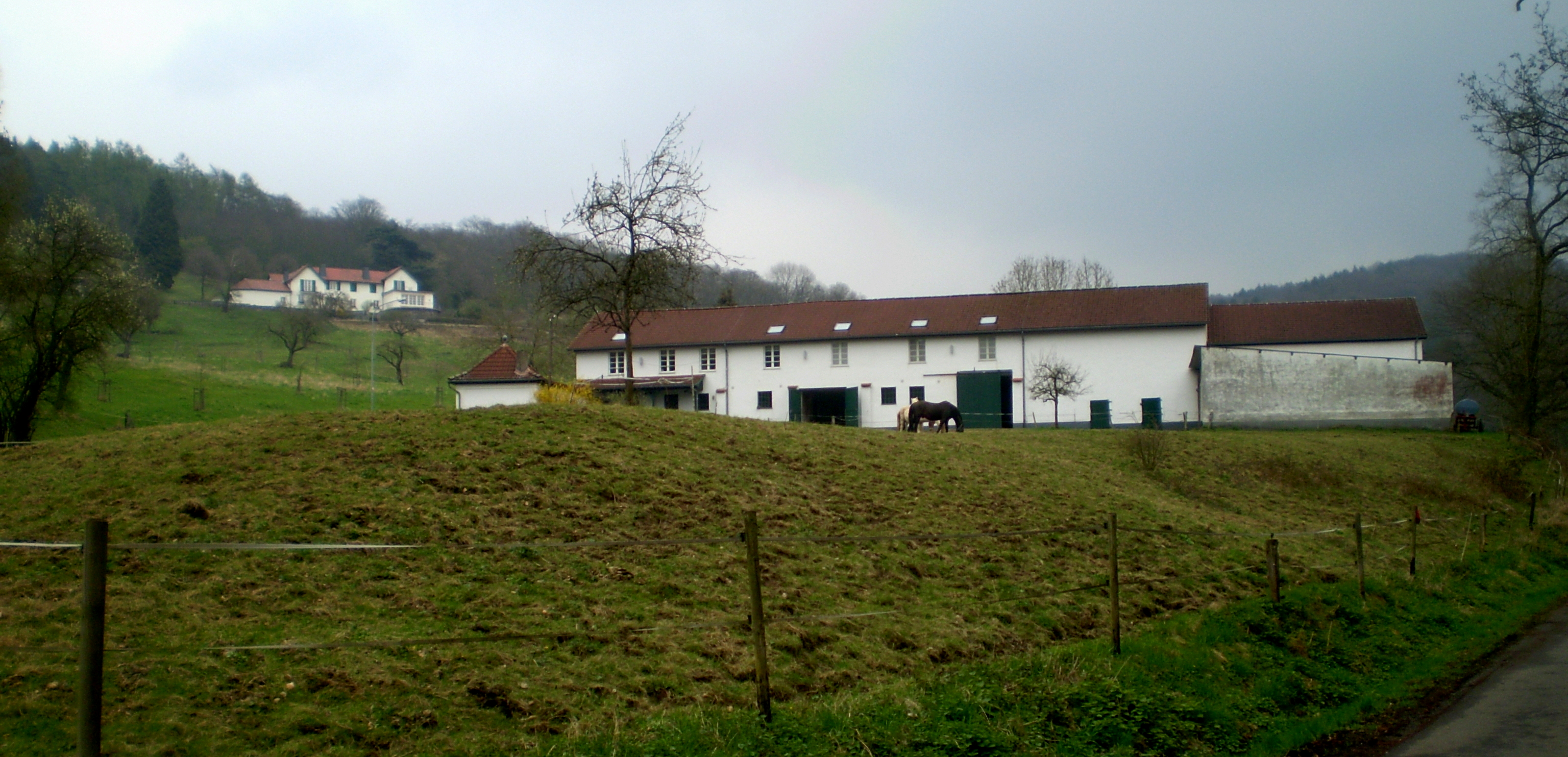 Steinsbüscher Hof im Mucherwiesental, Bad Honnef